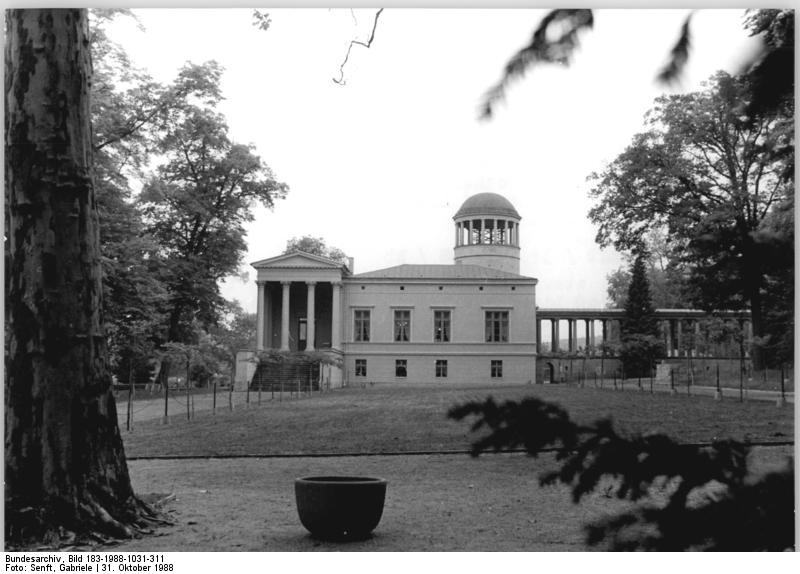 Für Bezieher des ADN-Reportagedienstes! Zum Beitrag: Dornröschenschloß erweckt von Medizinern - Lindstedt erstrahlt in neuem Glanz ADN-ZB-Senft - 31.10.1988 - bb- Das kleine, etwas abseits von Park Sannsouci gelegene Schloß Lindstedt ist seit 1984 Verwaltungssitz des Institiutes für Gerichtliche Medizin Potsdam. Seit Übernahme durch die neuen Hausherren erhielt das historische Gebäude eine umfassende Verfüngungskur, bei der die Mediziner viele Potsdamer als Verbündete gewannen. (Hierzu gehören die Fotos 1988-1031-311N - 313N!)